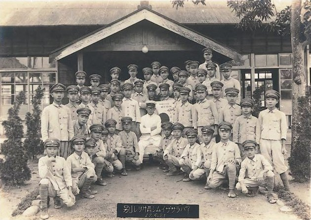 中文（台灣）: 日軍自西元1942年（昭和17年）中途島戰敗後，兵員消耗驟增，於是緊急徵兵籌集戰備人員，照片中即為老師出征之前與學生合影，攝於西元1942年（昭和17年）5月21日。